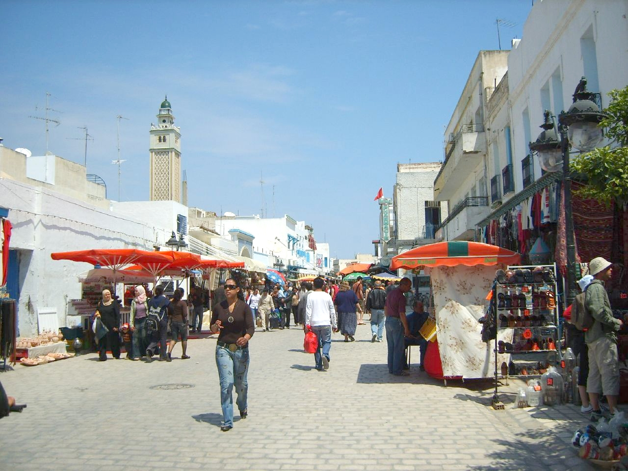 Rue du marché de Nabeul (Tunisie)